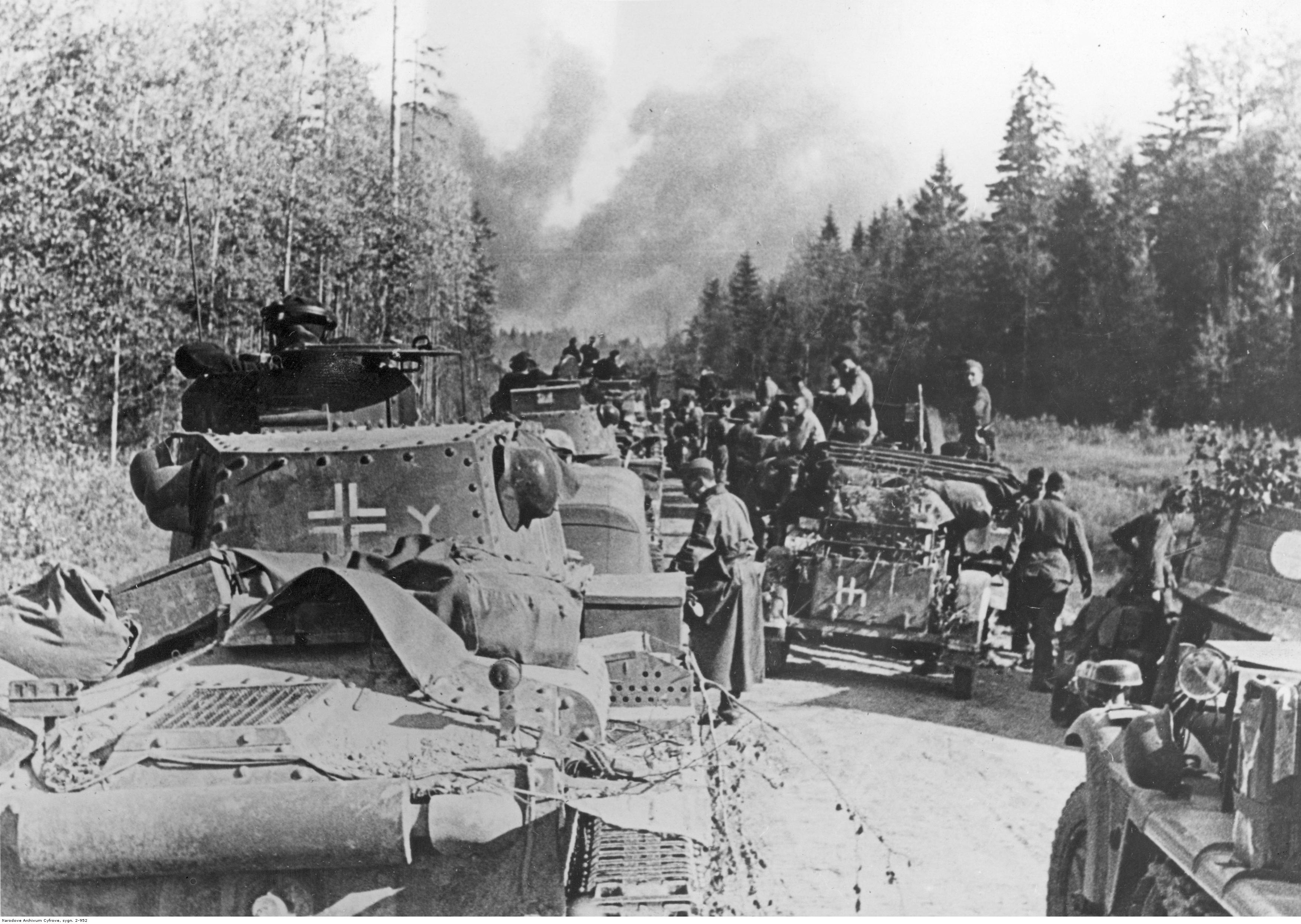 Niemieckie jednostki pancerne pod Wiaźmą czekają na rozkaz do natarcia. Z lewej strony widoczny czołg PzKpfw 38 (t) z 7. dywizji pancernej.